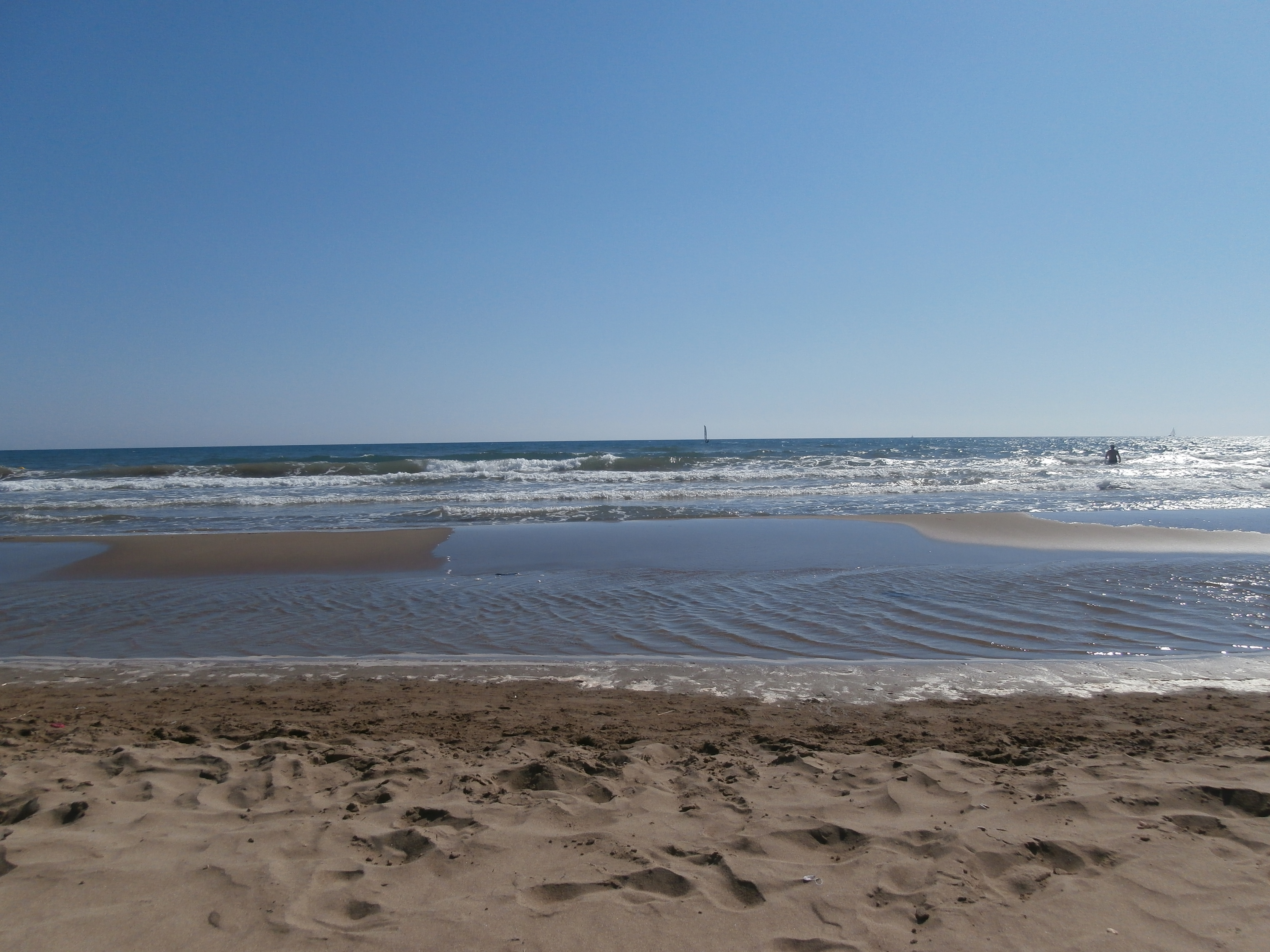 Πλαζ Λετρινα